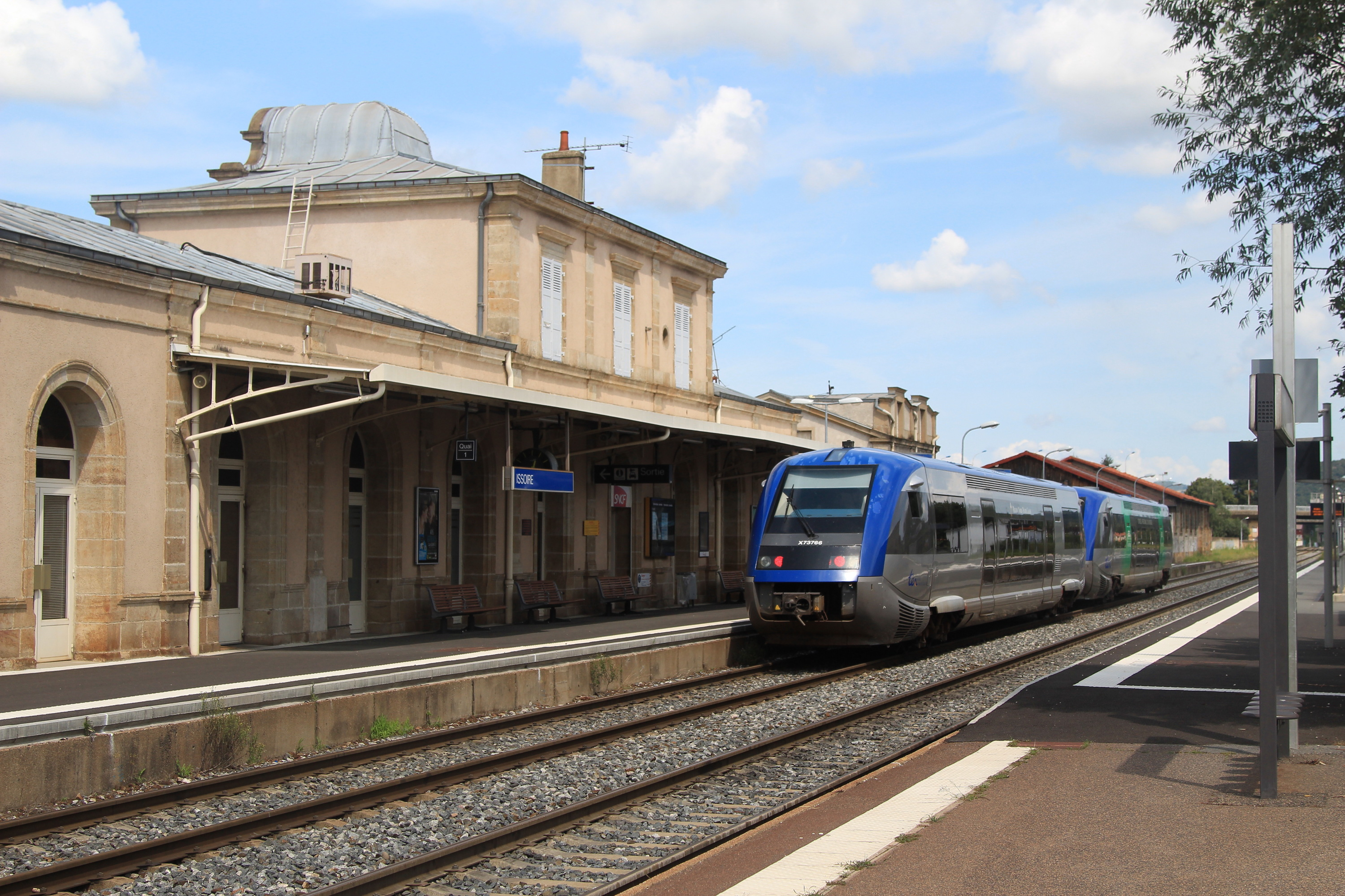 L'X 73537 (en livrée Auvergne) et l'X 73766 (en livrée TER institutionnelle avec logo TER Nord-Pas-de-Calais) repartent de la gare d'Issoire, assurant le TER 873834 (Aurillac - Clermont-Ferrand).